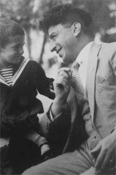 ירושלים - ד"ר אברהם גרנות ובנו